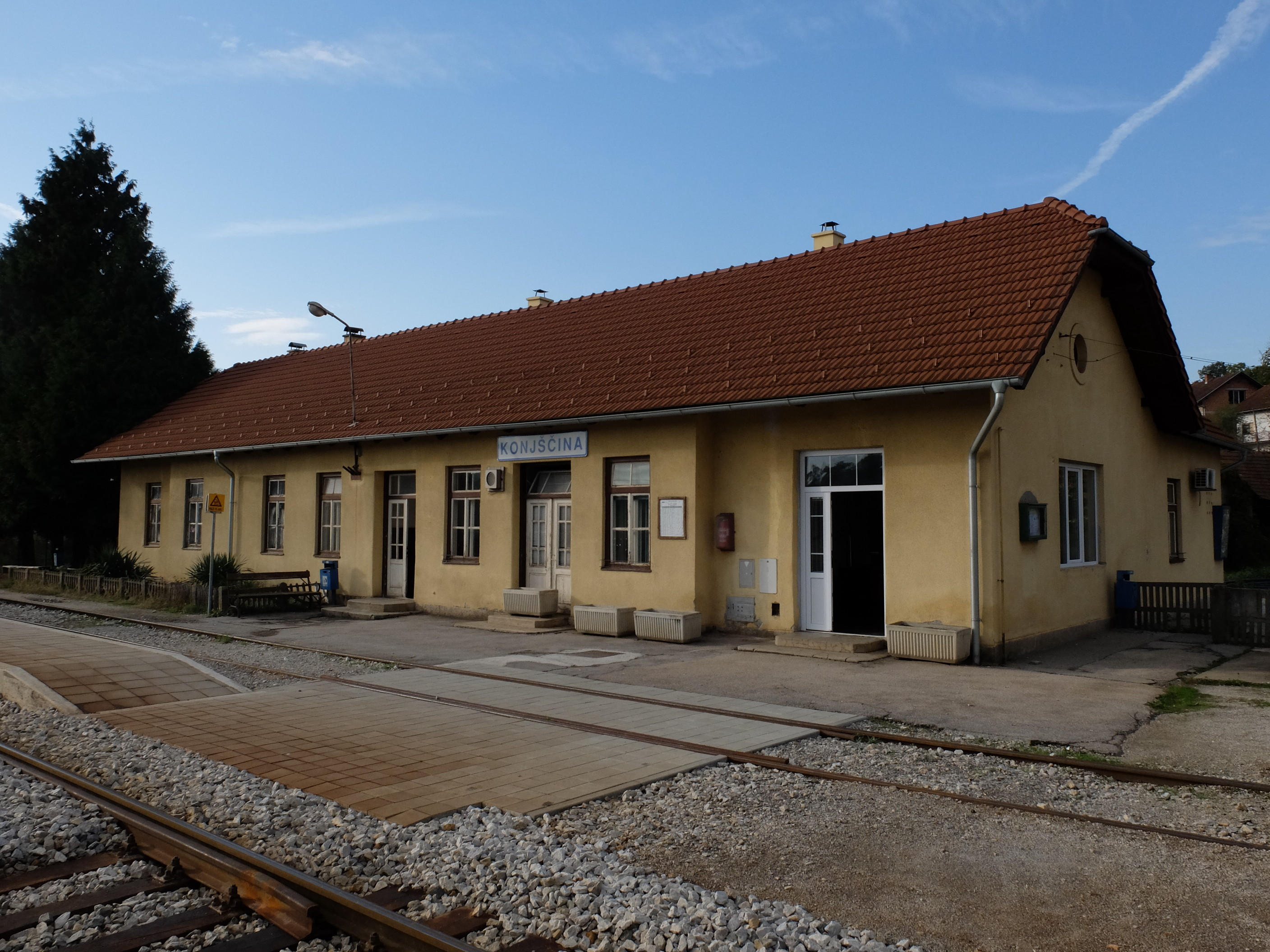 Konšćina (Bahnhof)